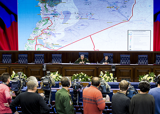 Брифинга для иностранных военных атташе и журналистов начальника Главного оперативного управления Генерального штаба Вооруженных Сил России генерал-полковника Андрея Картаполова